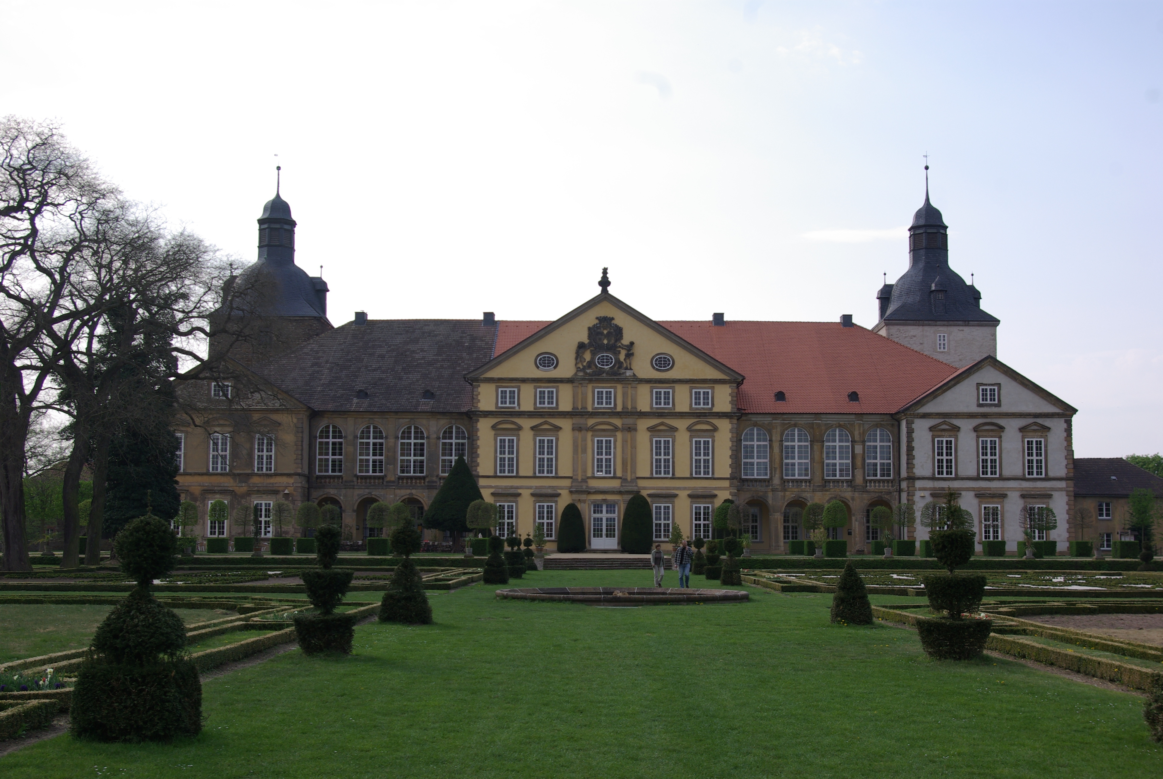 Haldensleben in Sachsen-Anhalt. Das Schloss Hundisburg steht unter Denkmalschutz.